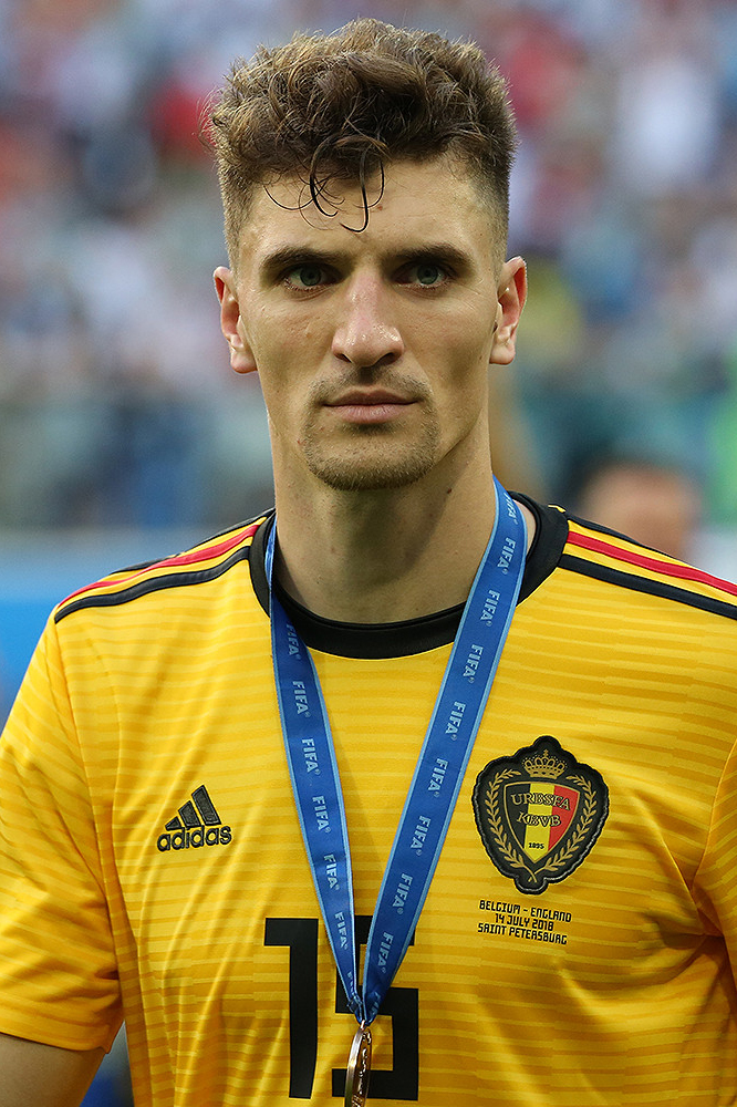 Сборная Бельгии впервые в истории завоевала бронзу ЧМ